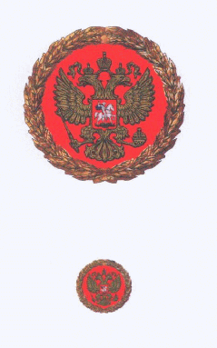 Почётная грамота Президента Российской Федерации